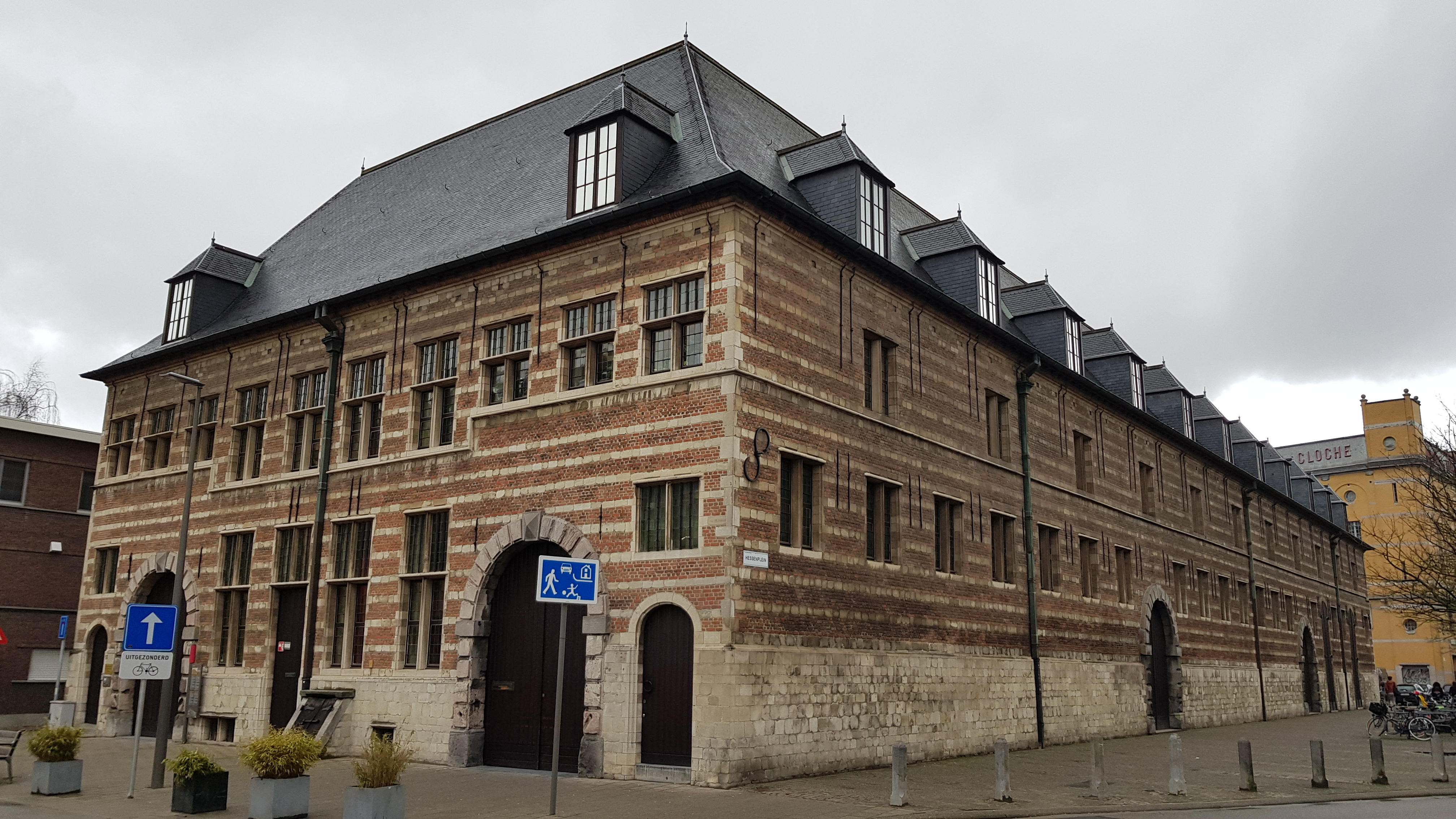 Hessenhuis, Antwerpen, België